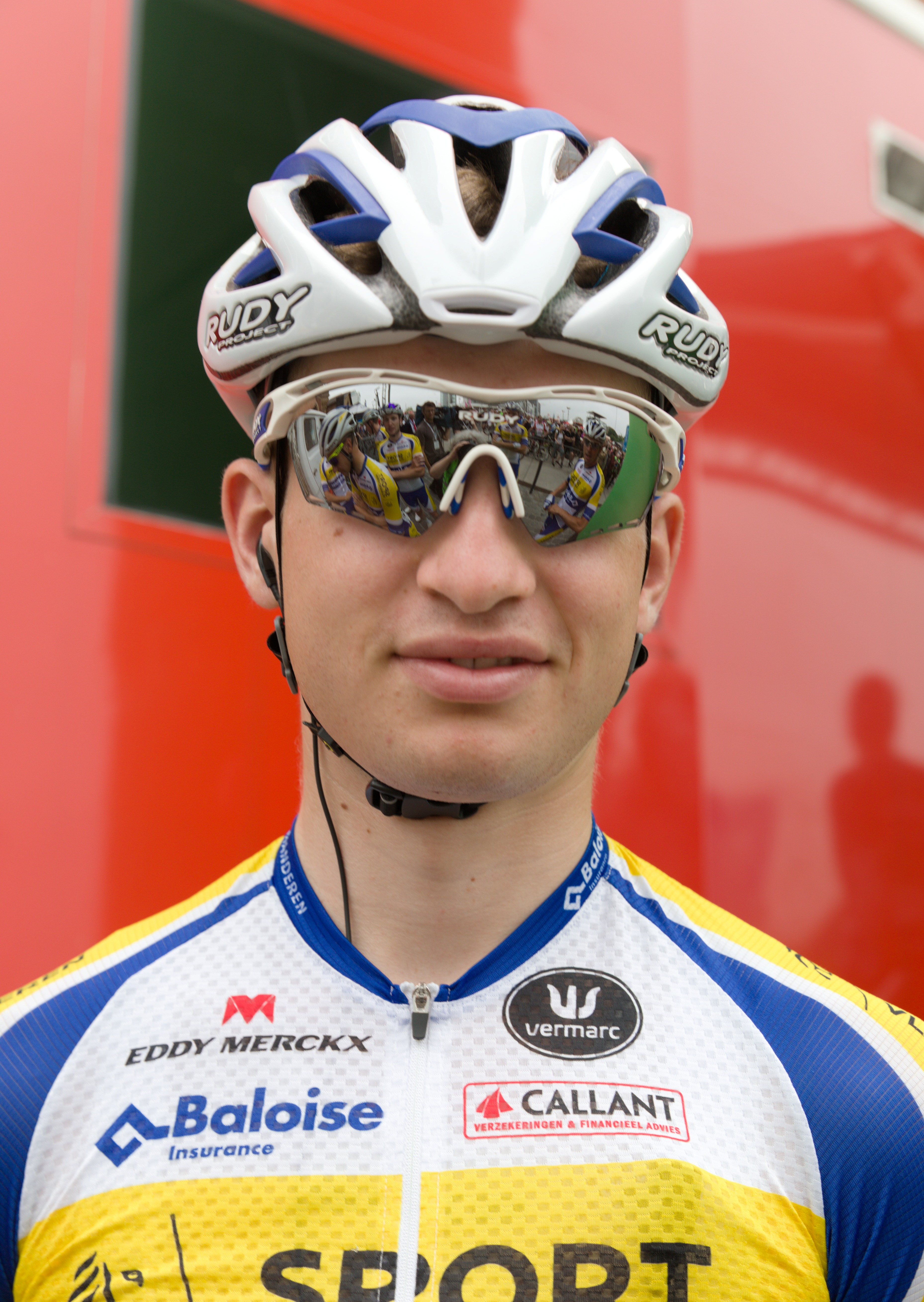 Aaron Verwilst, belgischer Radsportler